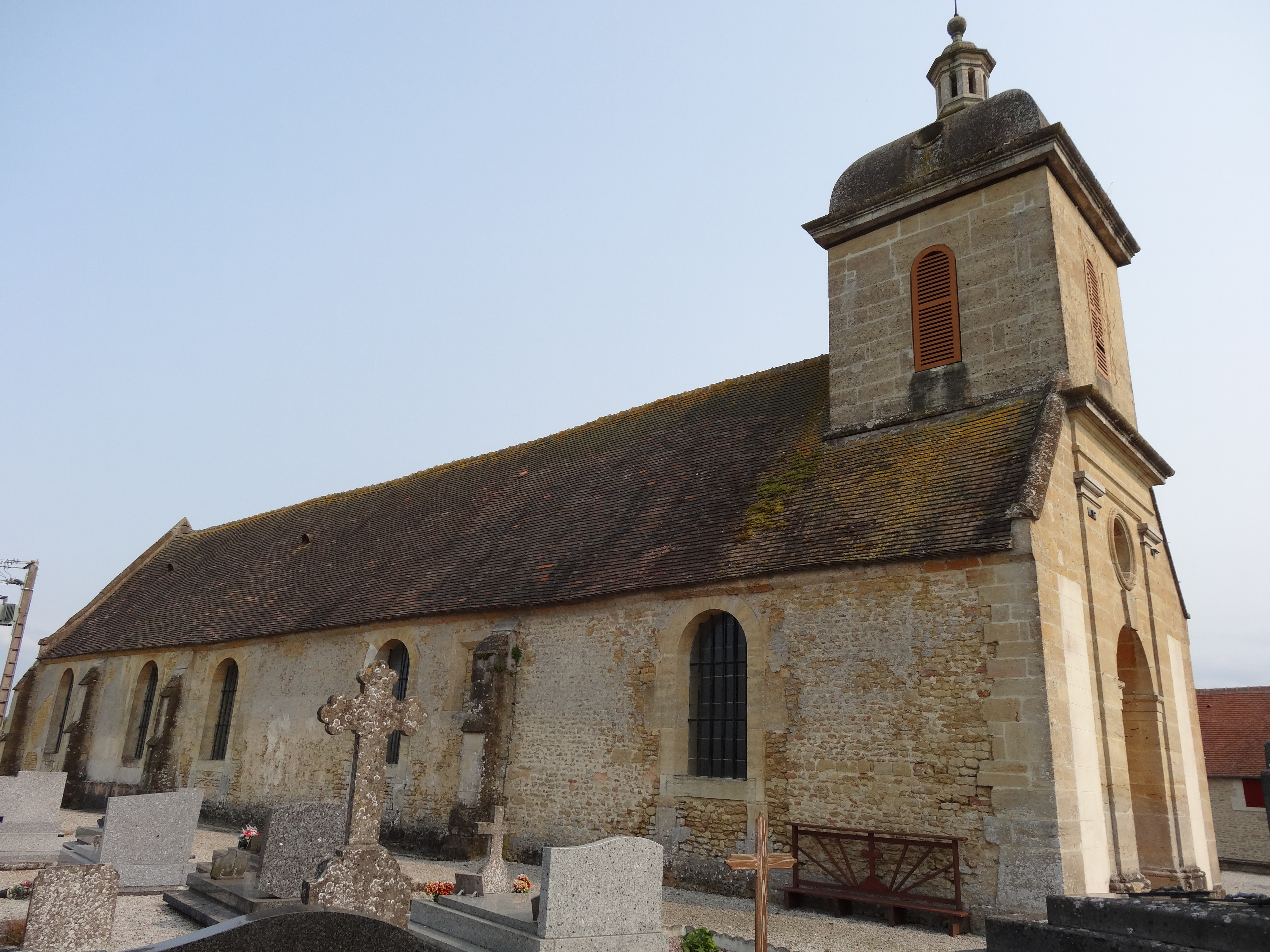 Hiéville (Calvados) église St Pierre, XIVe et XVIIIe siècles